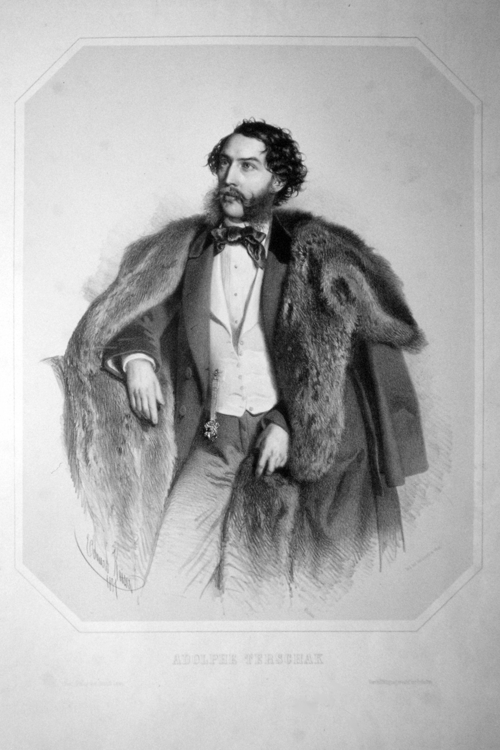 Adolf Terschak (1832-1901). österreichischer Fötist und Komponist. Lithographie von Eduard Kaiser, 1850